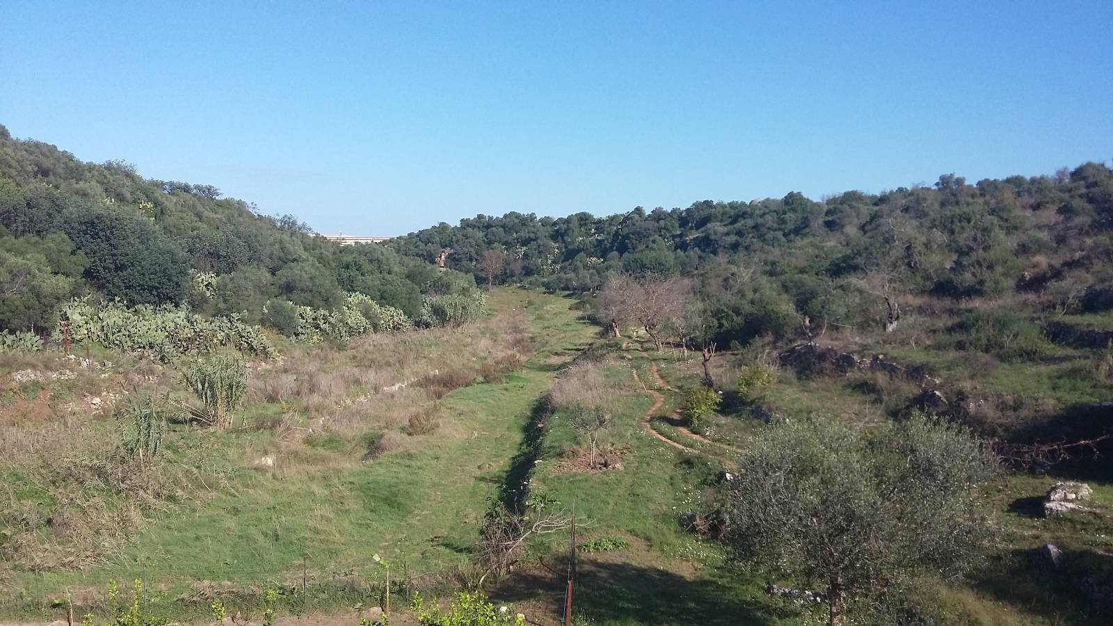 Conca della lama Balice, fotografata con l'obiettivo rivolto verso est, dal ponte di pietra ottocentesco della vecchia strada Palese-Modugno, nel territorio del quartiere barese di Palese, alle adiacenze con il San Paolo.